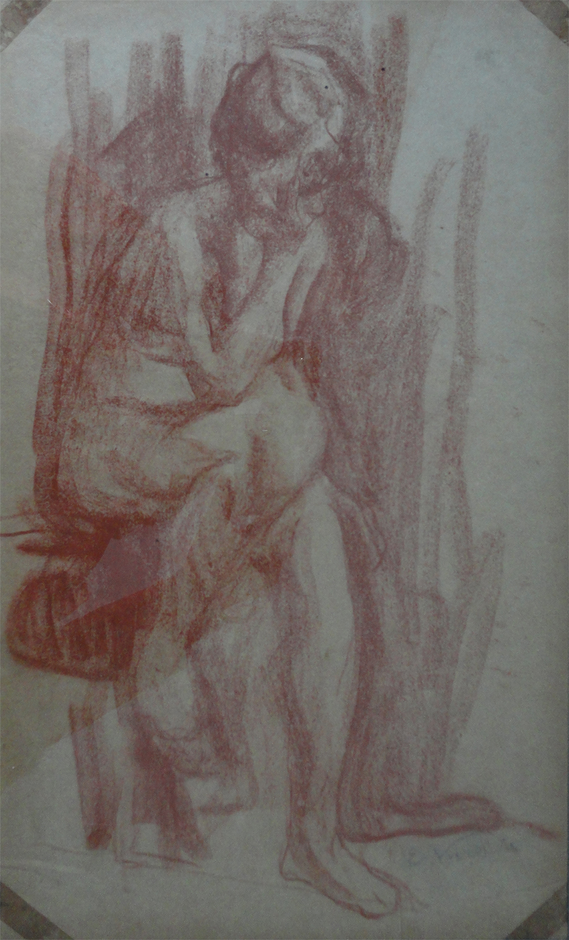 Obra do Projeto Eliseu Visconti